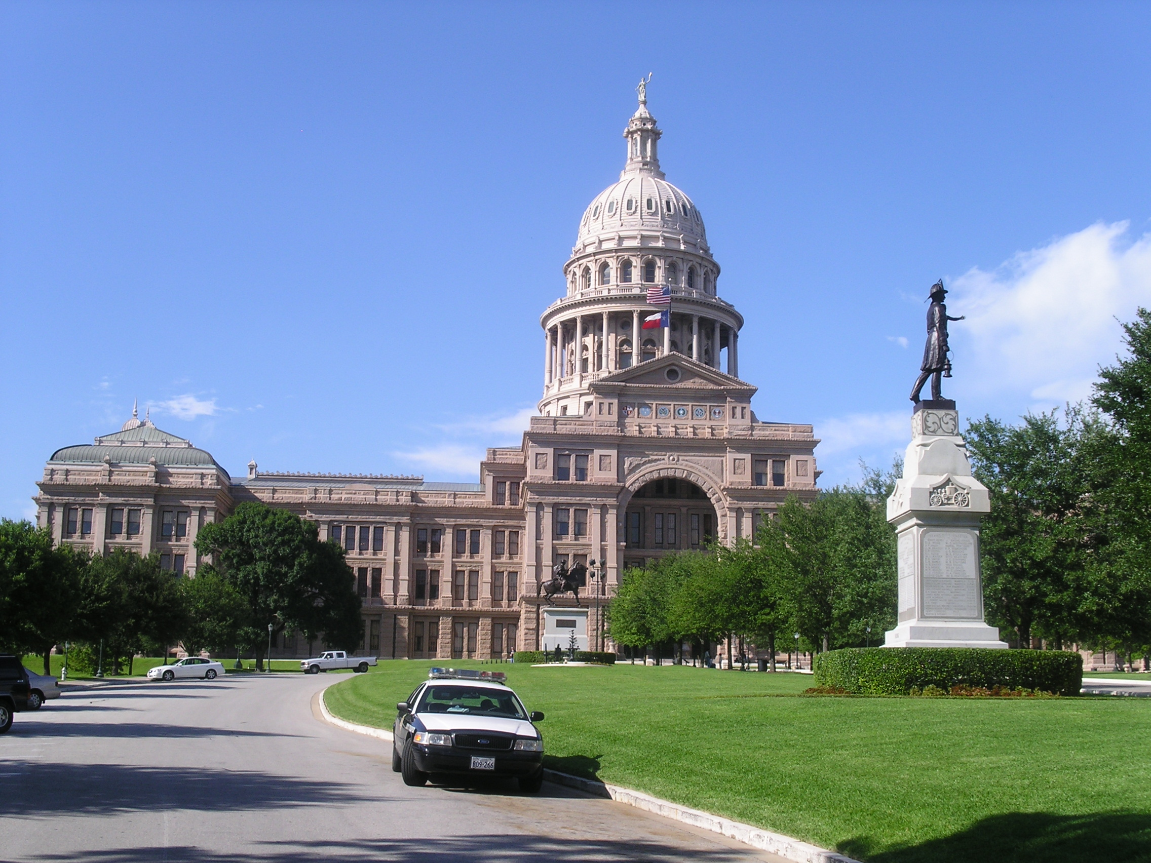 Fotografie budovy kapitolu v hlavním městě Texasu Austinu pořízená v srpnu roku 2005.